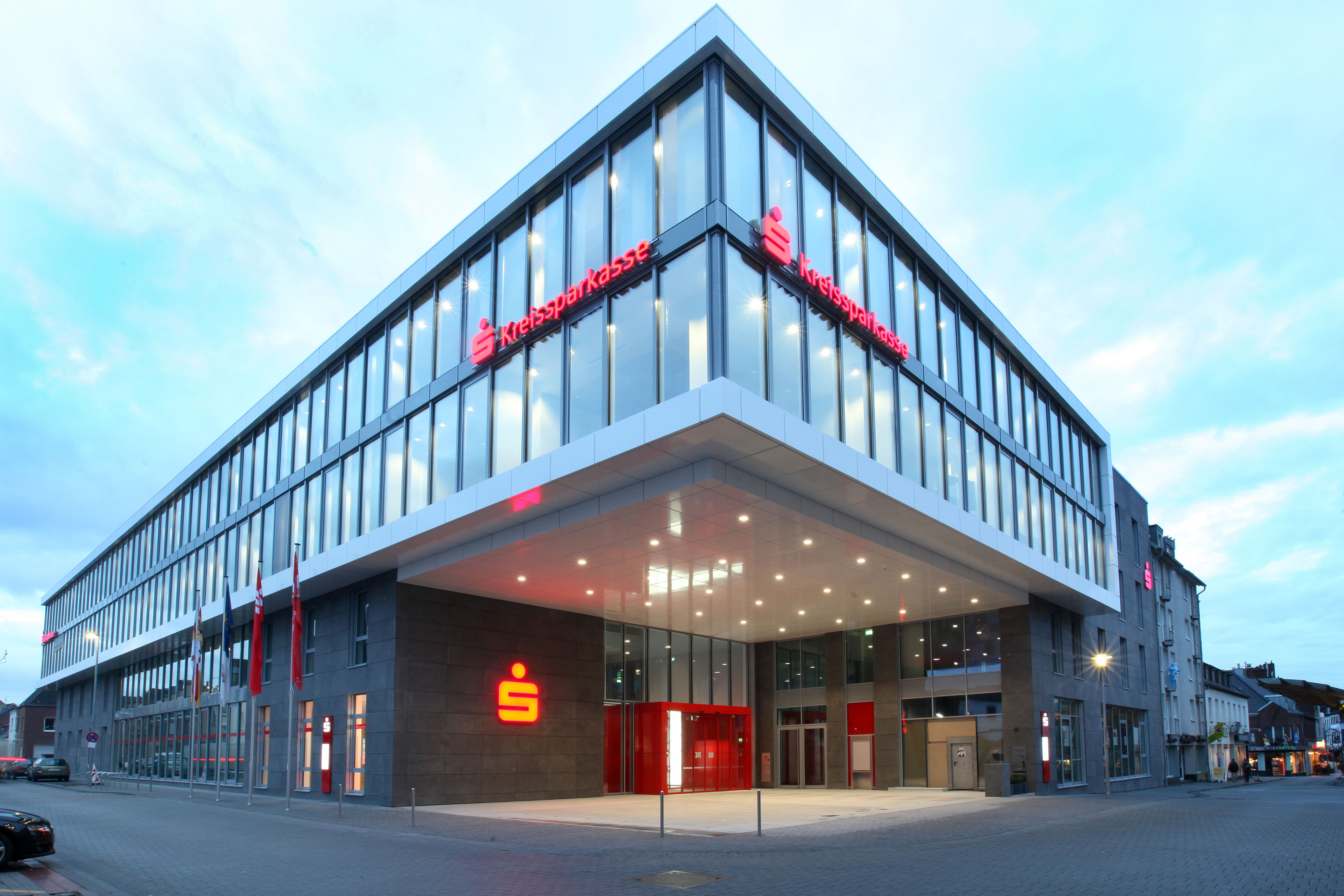 Hauptstellengebäude der Kreissparkasse Heinsberg, Dr.-Eberle-Platz 1, 41812 Erkelenz